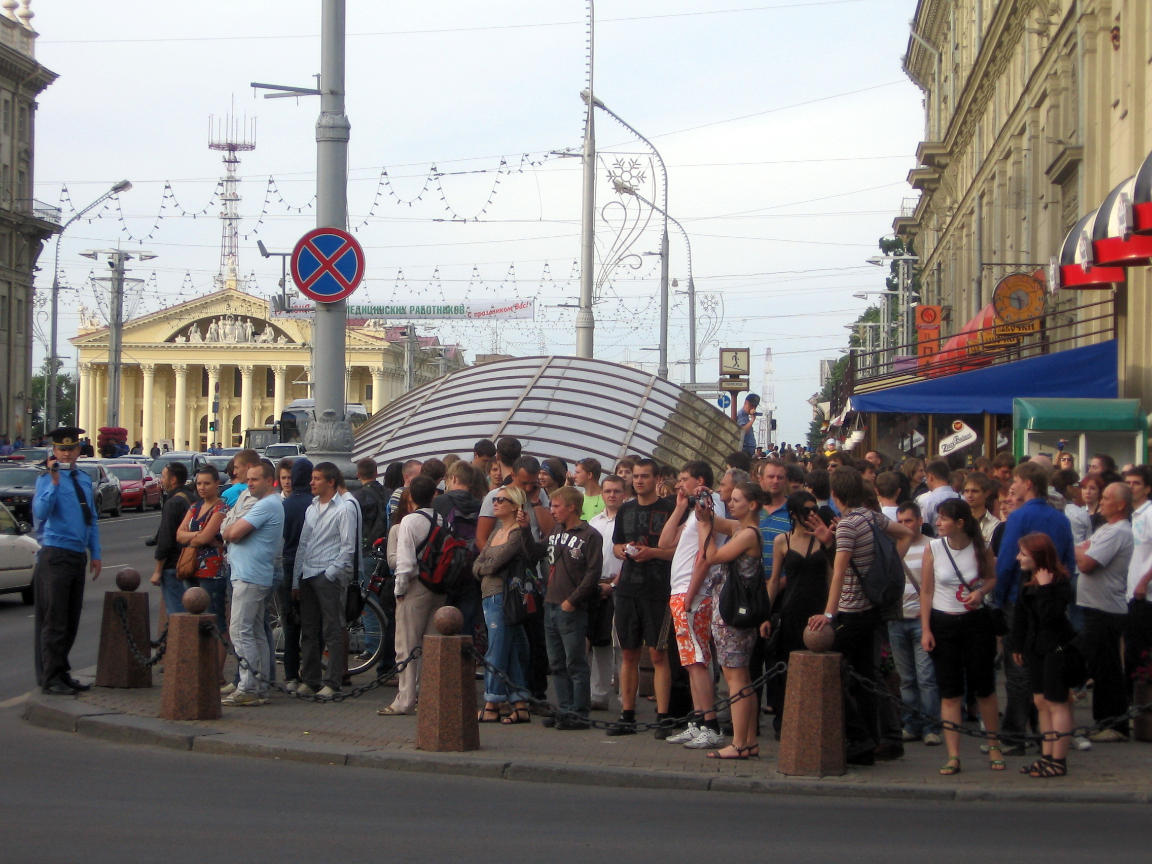 Видеосъёмка участников акции сотрудниками милиции (один слева, второй на парапете выхода из метро у столба-указателя).